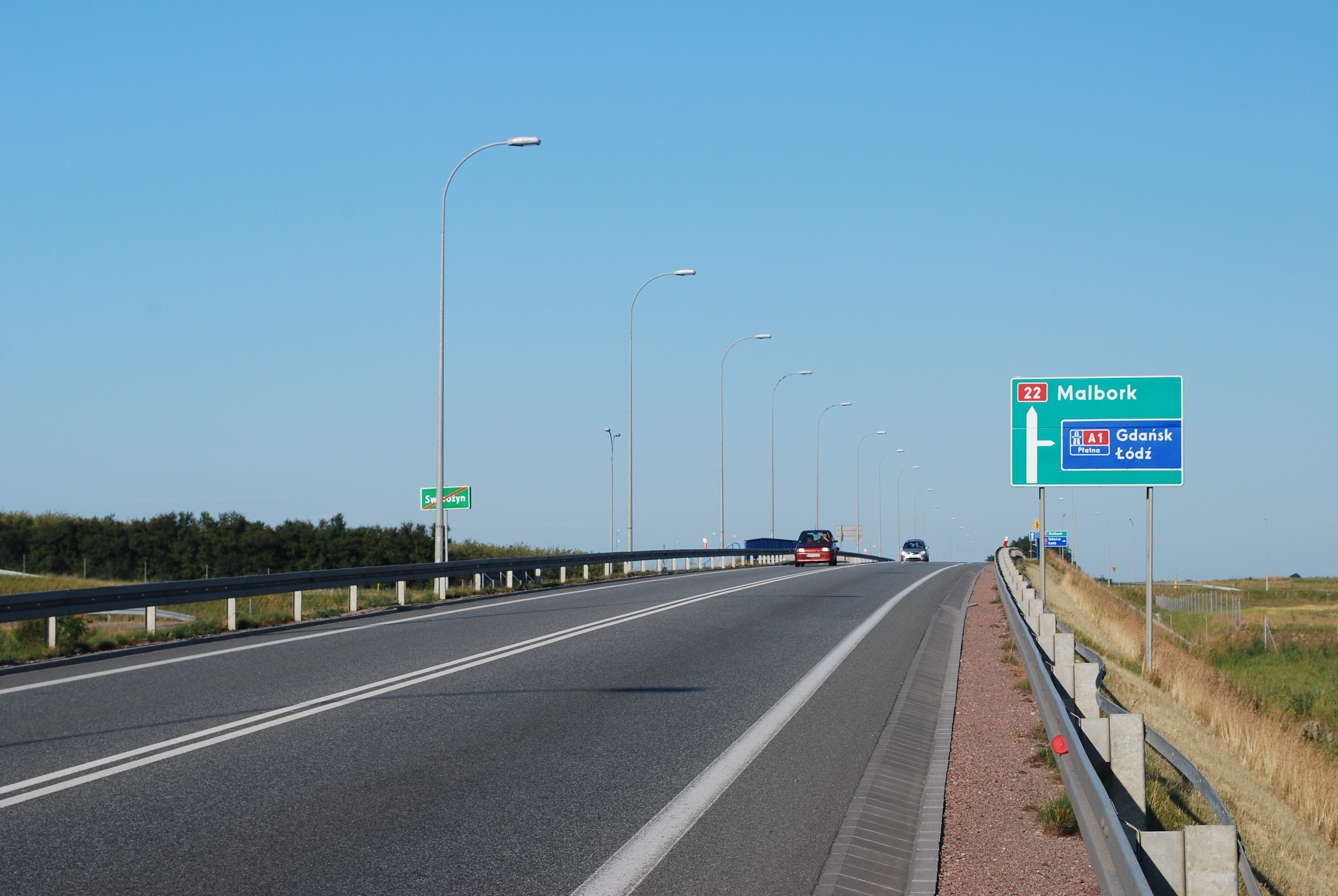 Wiadukt nad Autostrada A1 pod Swarożynem.